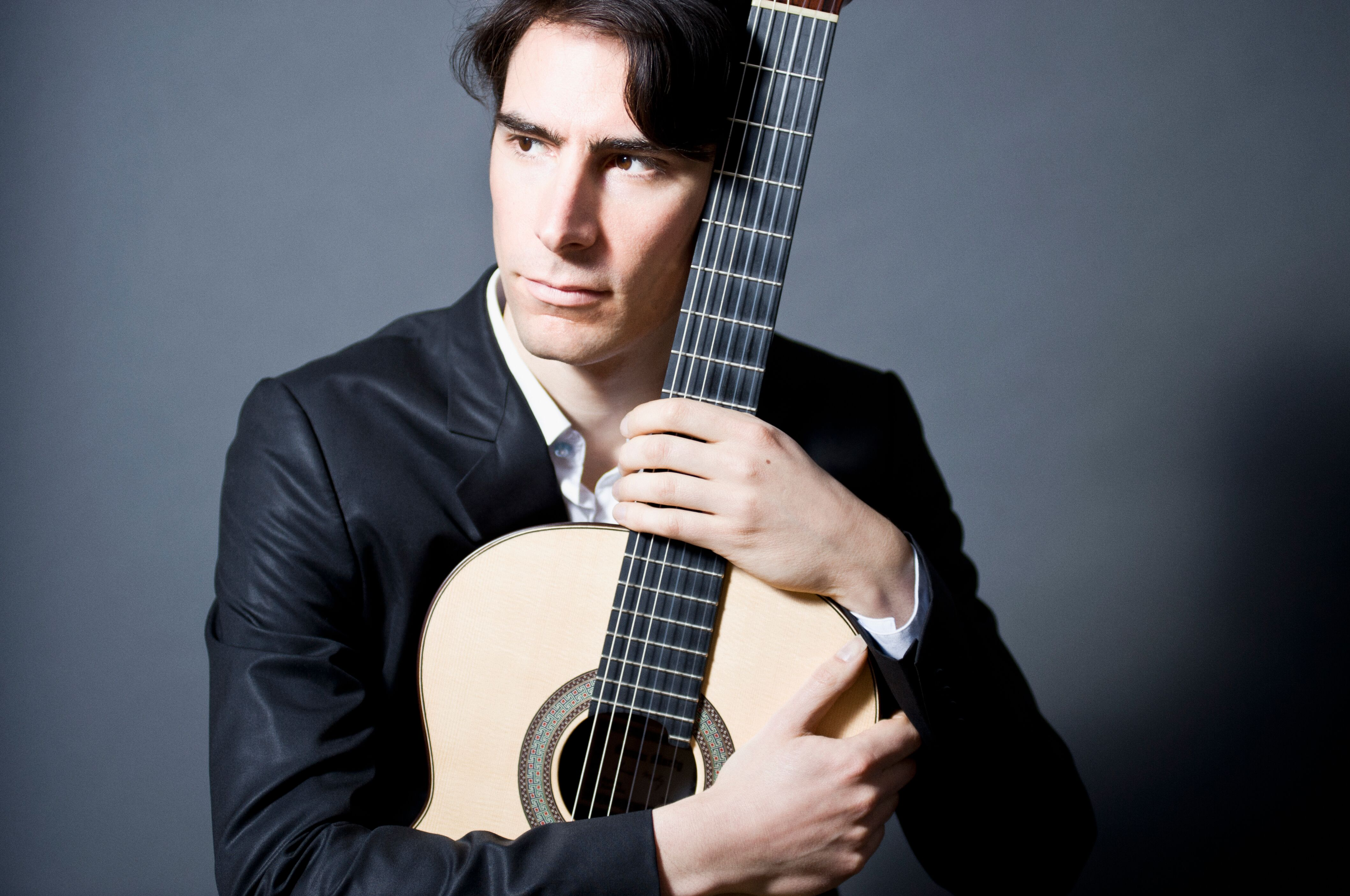 Photographie de Jérémy Jouve posant avec sa guitare